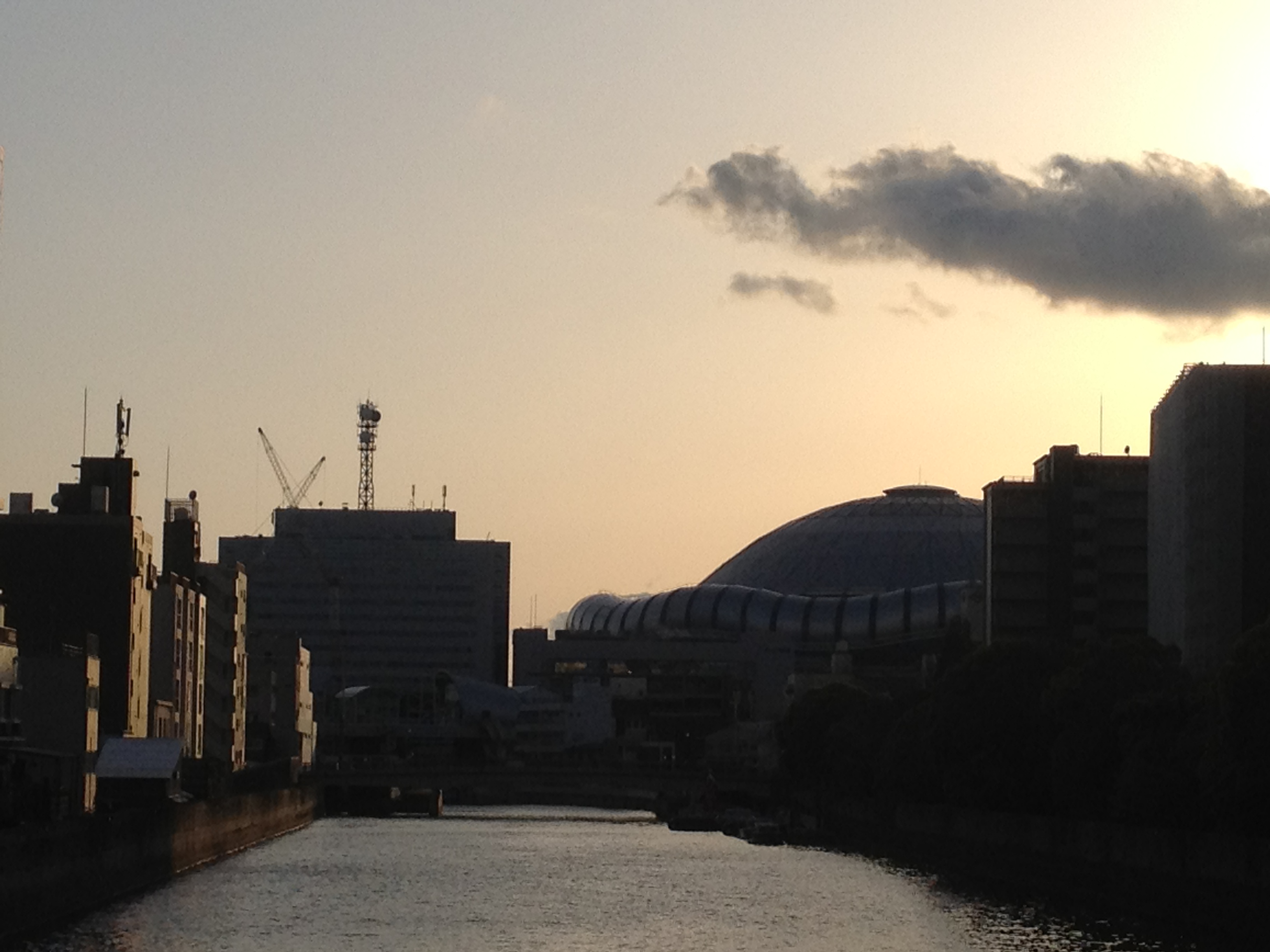 桜川駅付近（新なにわ筋）から見た大阪ドーム